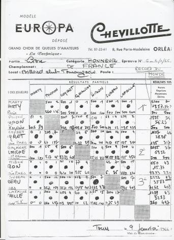 Feuille de match CF 66